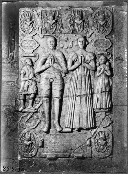 Gravhäll över Gustaf Johansson, död 1566 och Ingeborg Kristoffersdotter, död 1558. Kategori: (09) Gravar Gravhäll över Gustaf Johansson, död 1566 och Ingeborg Kristoffersdotter, död 1558.